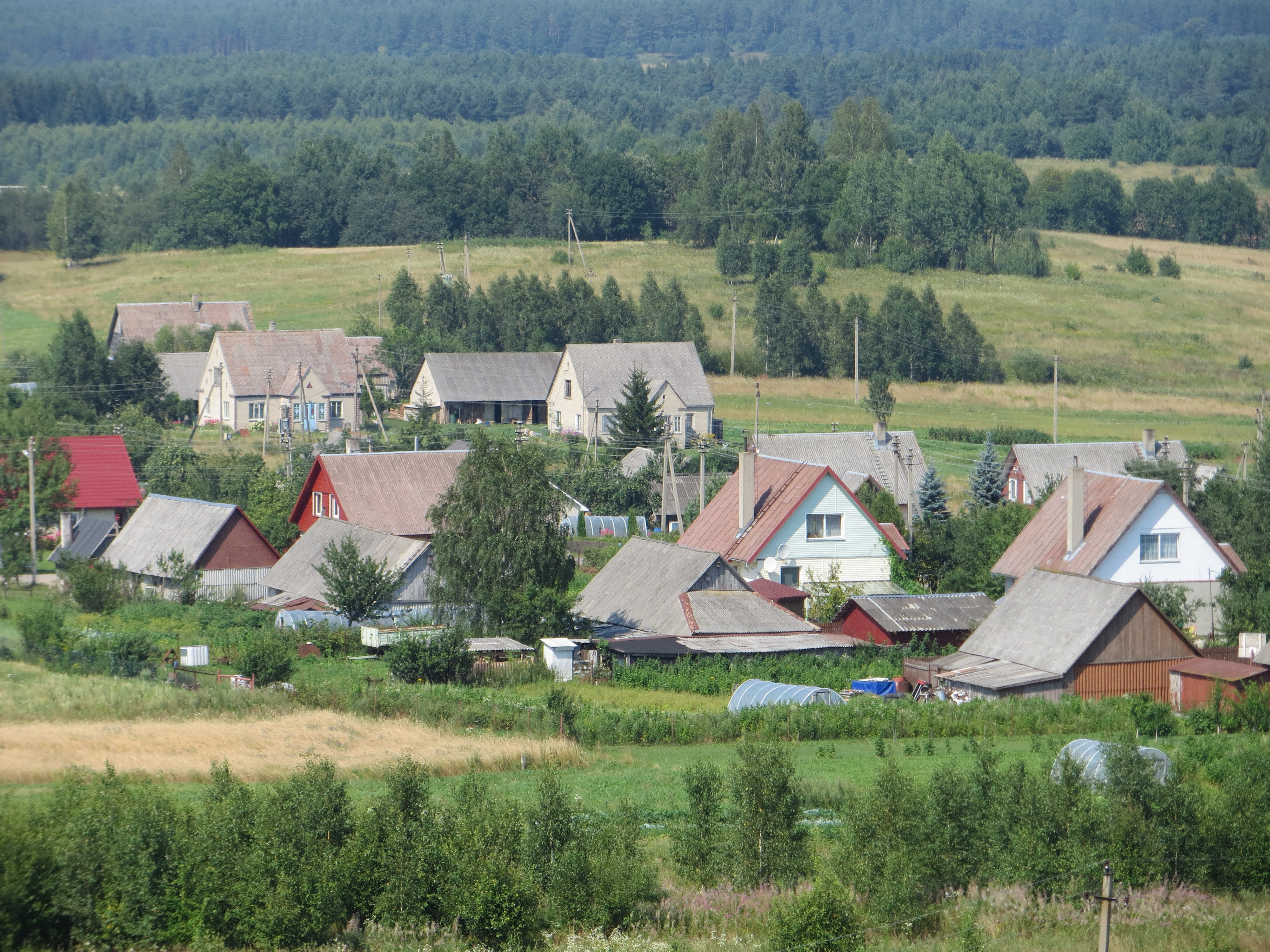 Rukainių sen., Lithuania